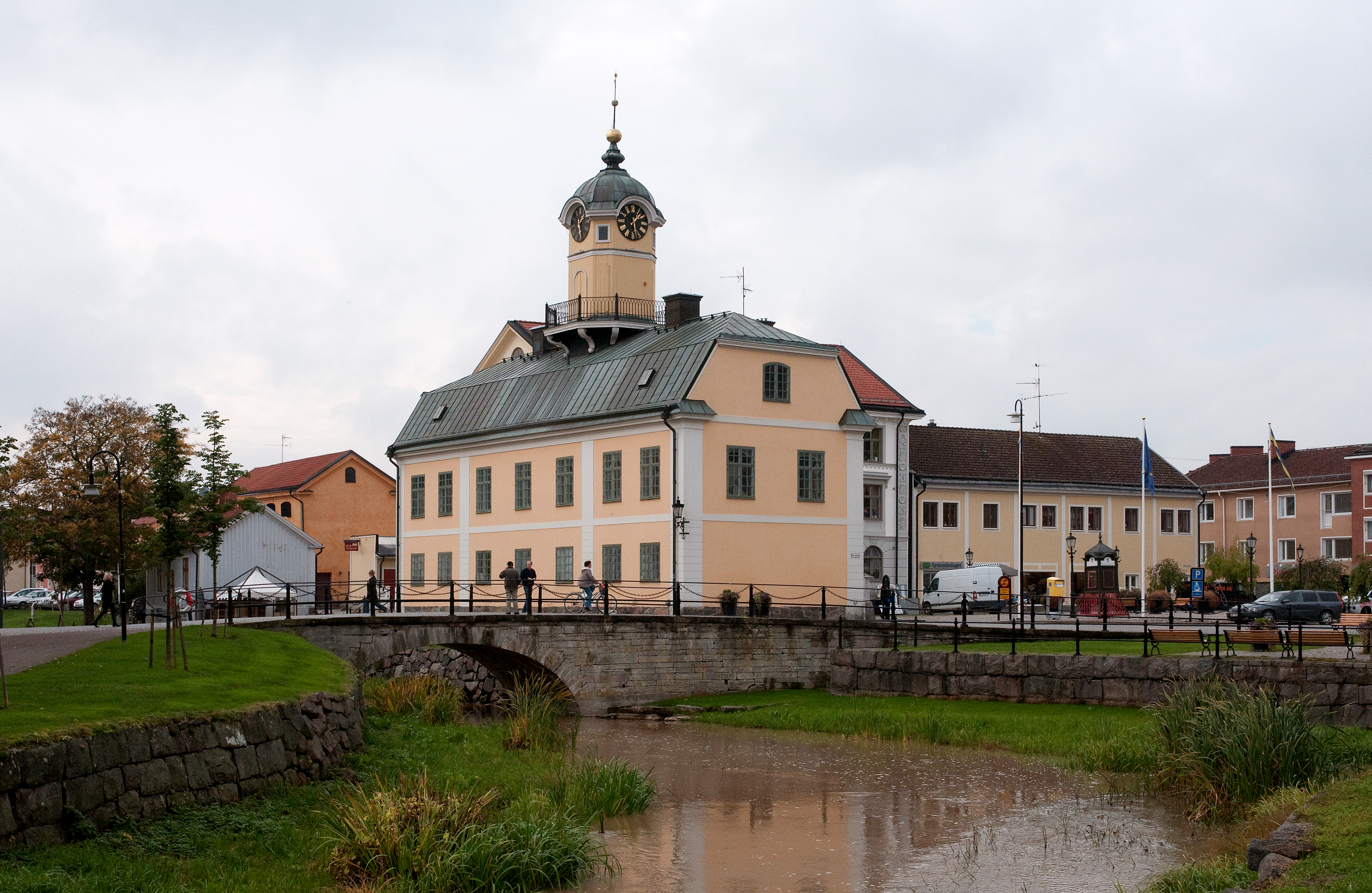 Söderköpings rådhus i oktober 2010